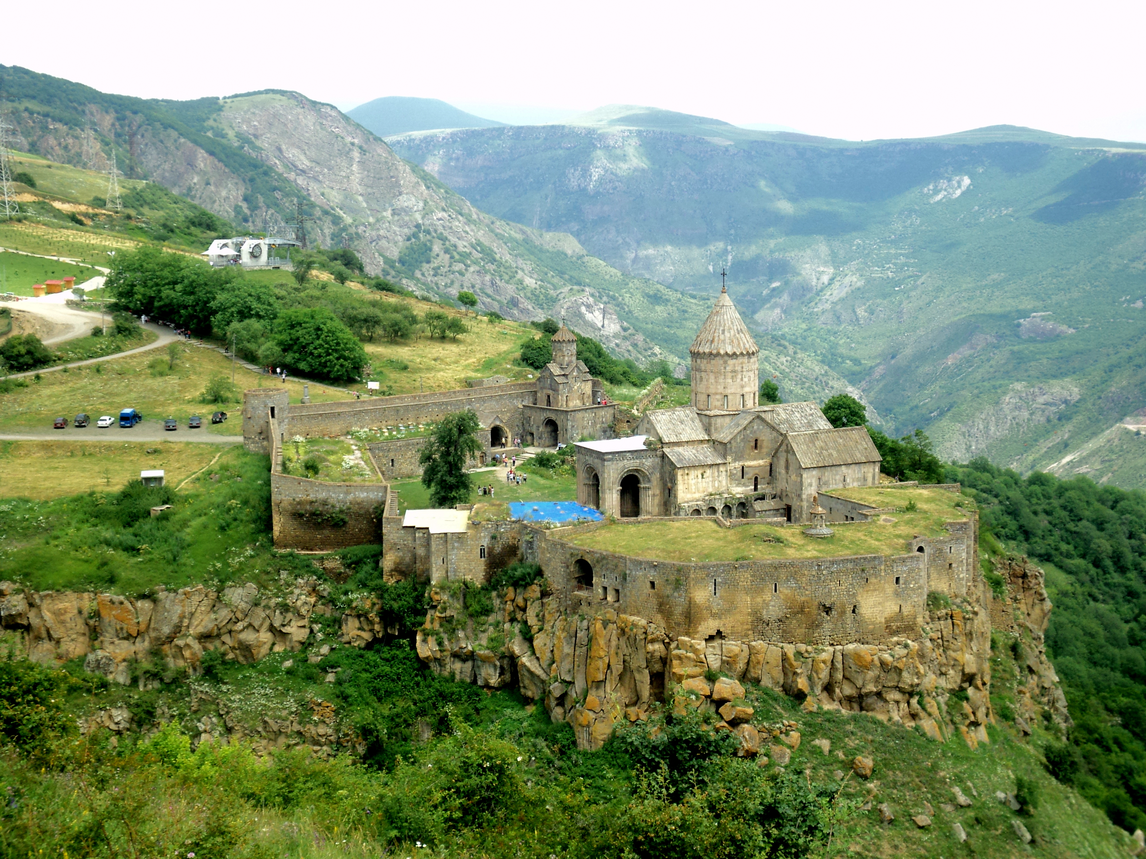 Տաթևի վանք